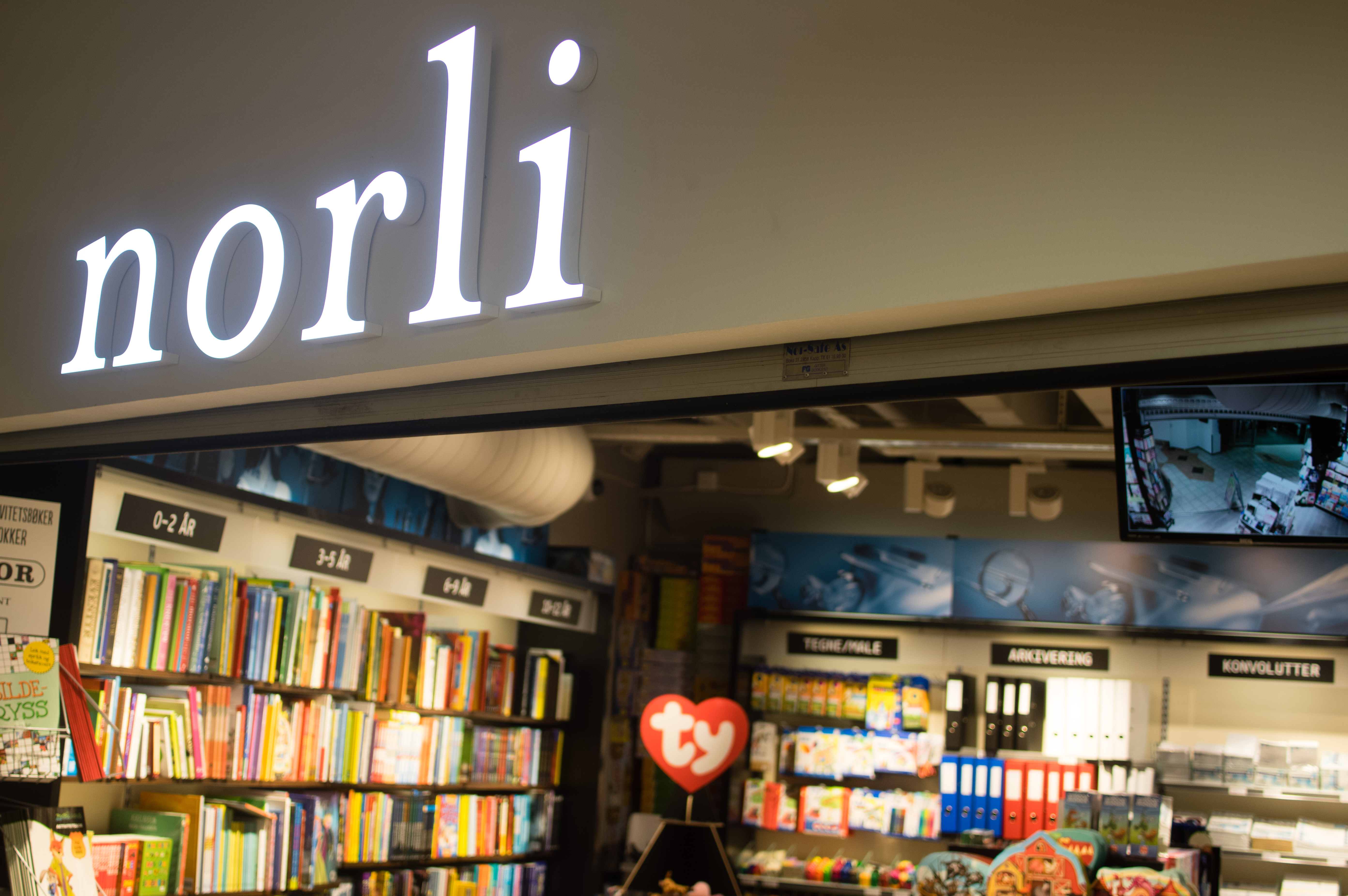 Ein Norlli-butikk.